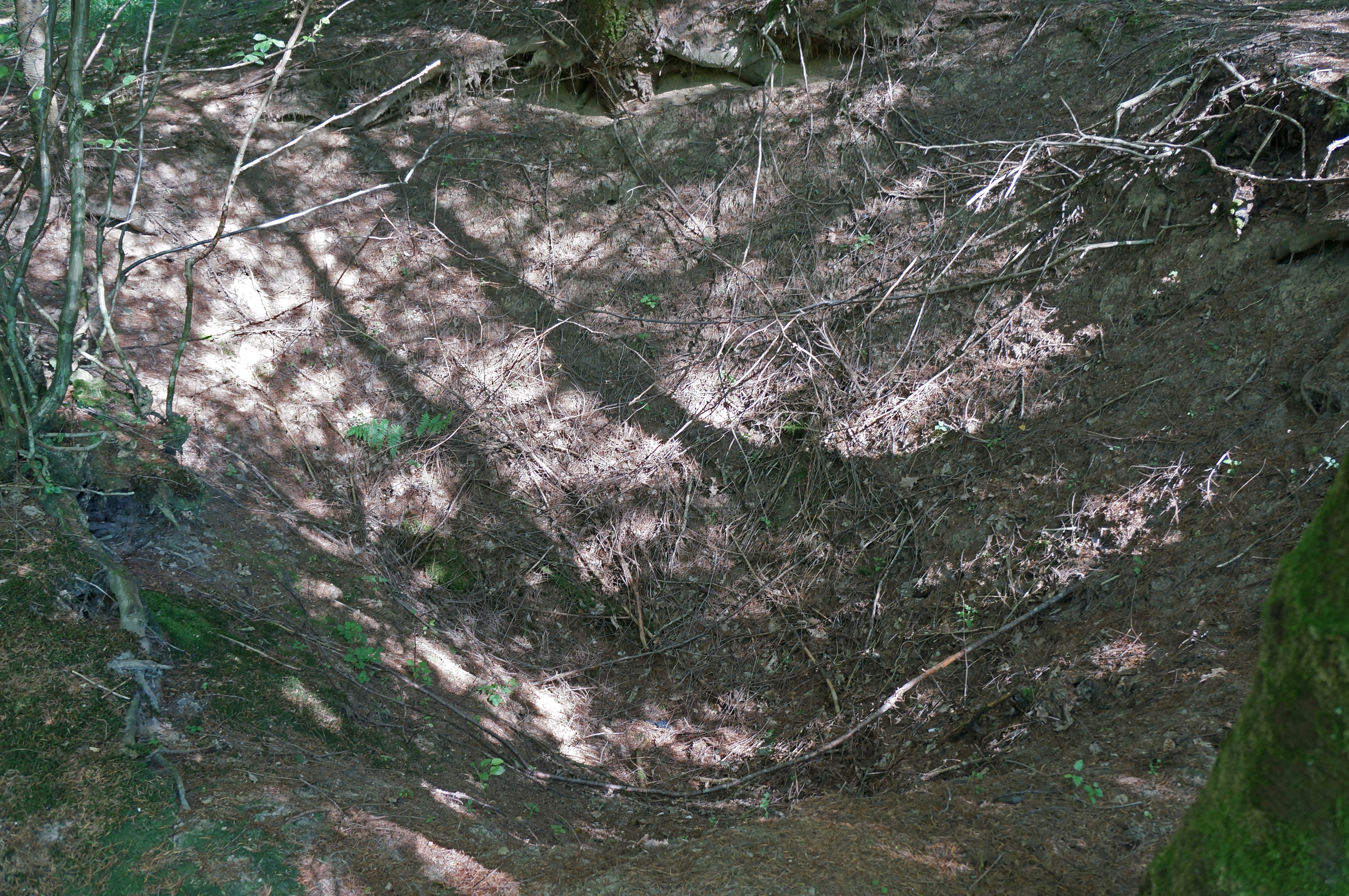 Effondrement de la galerie Fourchie.